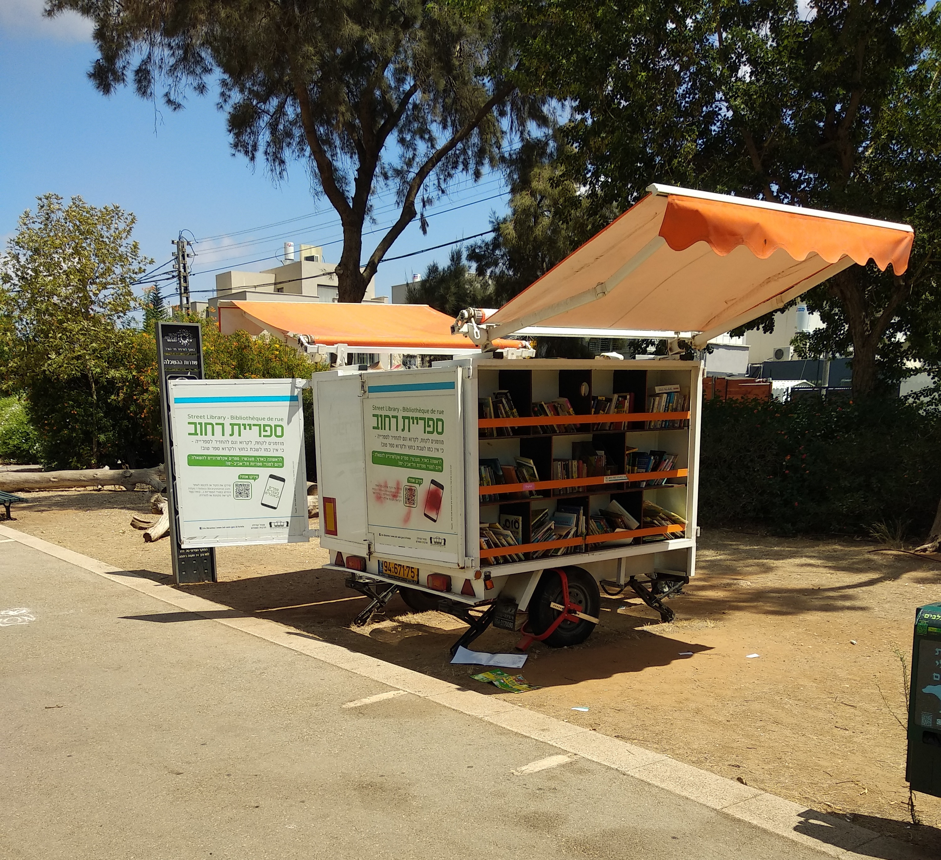 ספריית רחוב בשדרות ההשכלה, תל אביב